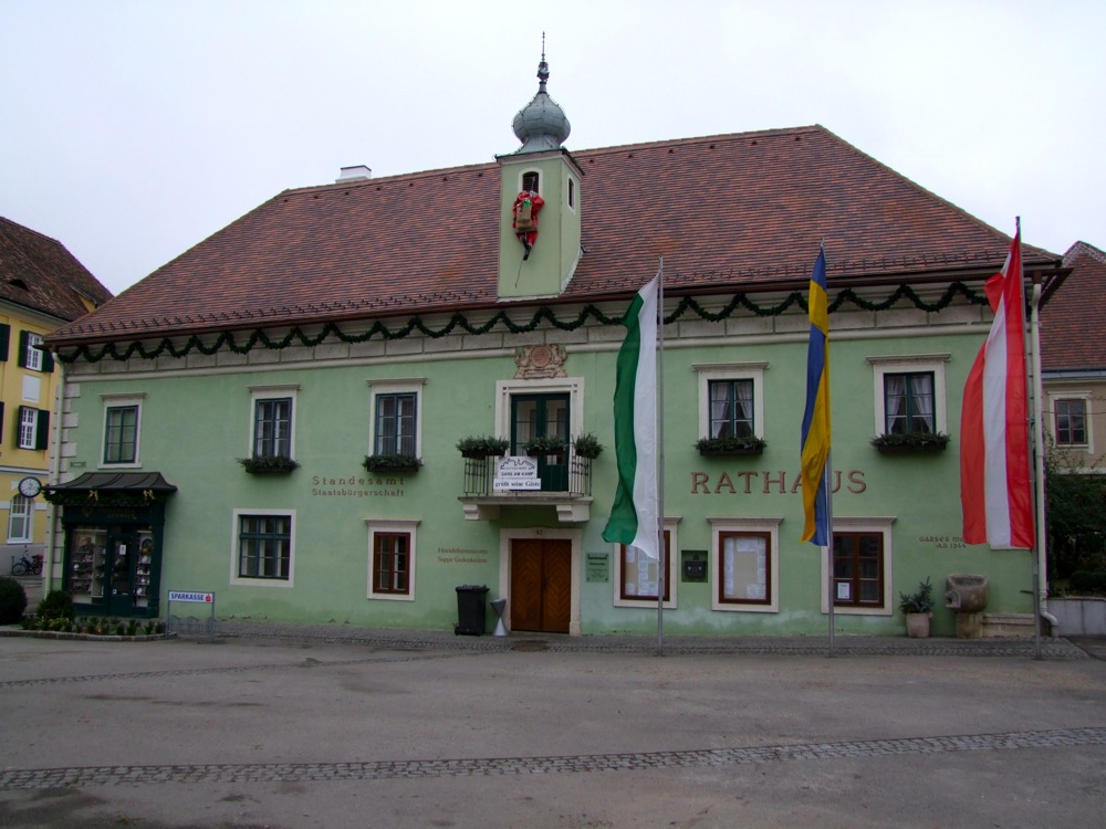 Rathaus